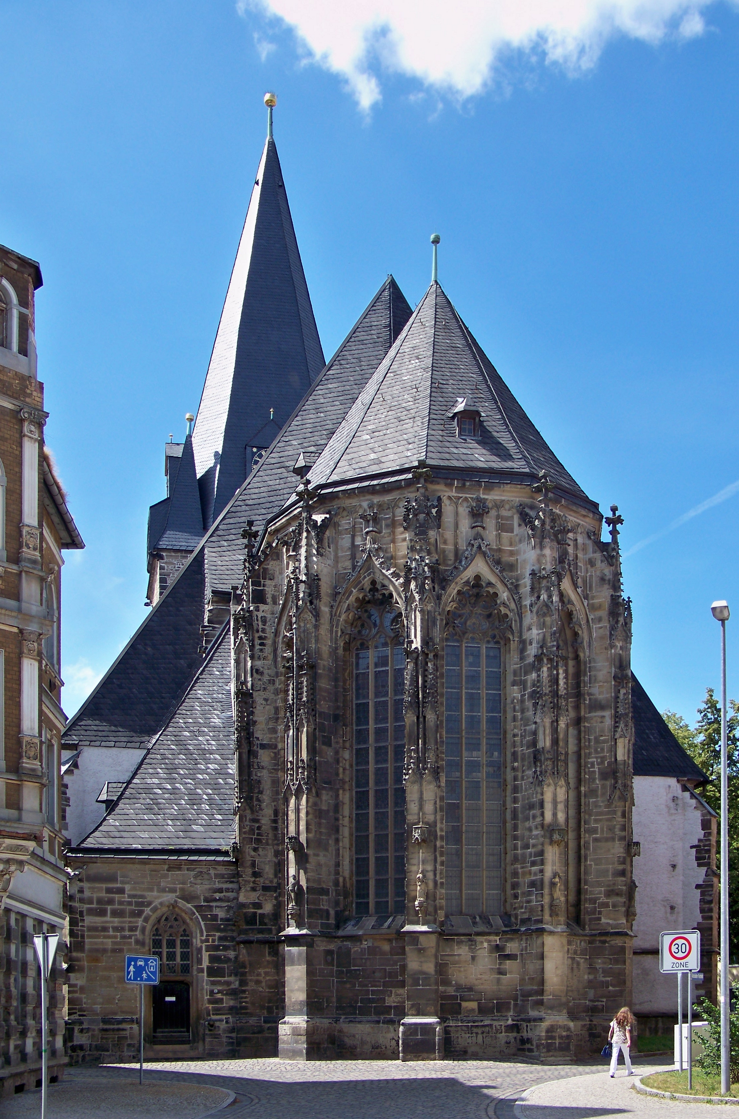 Marienkirche in Bernburg (Saale)